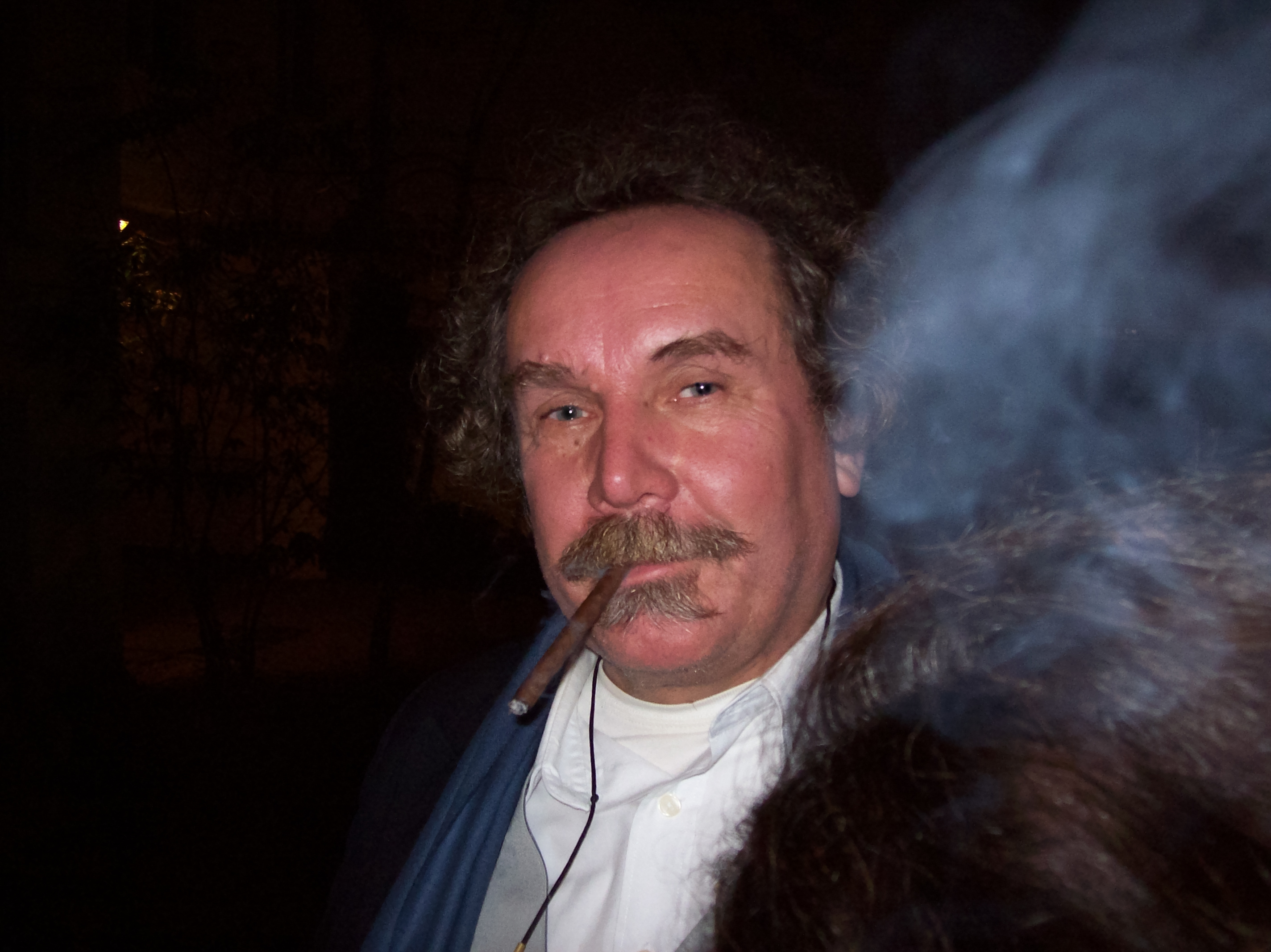 Horst Stowasser bei einer Veranstaltung von Bibliothek der Freien und Anarchistischer Föderation Berlin